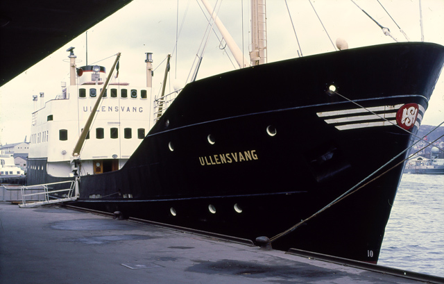 Ullensvang, bygd i 1952, Ved Holbergskaien i Bergen som avløysar i 1975.